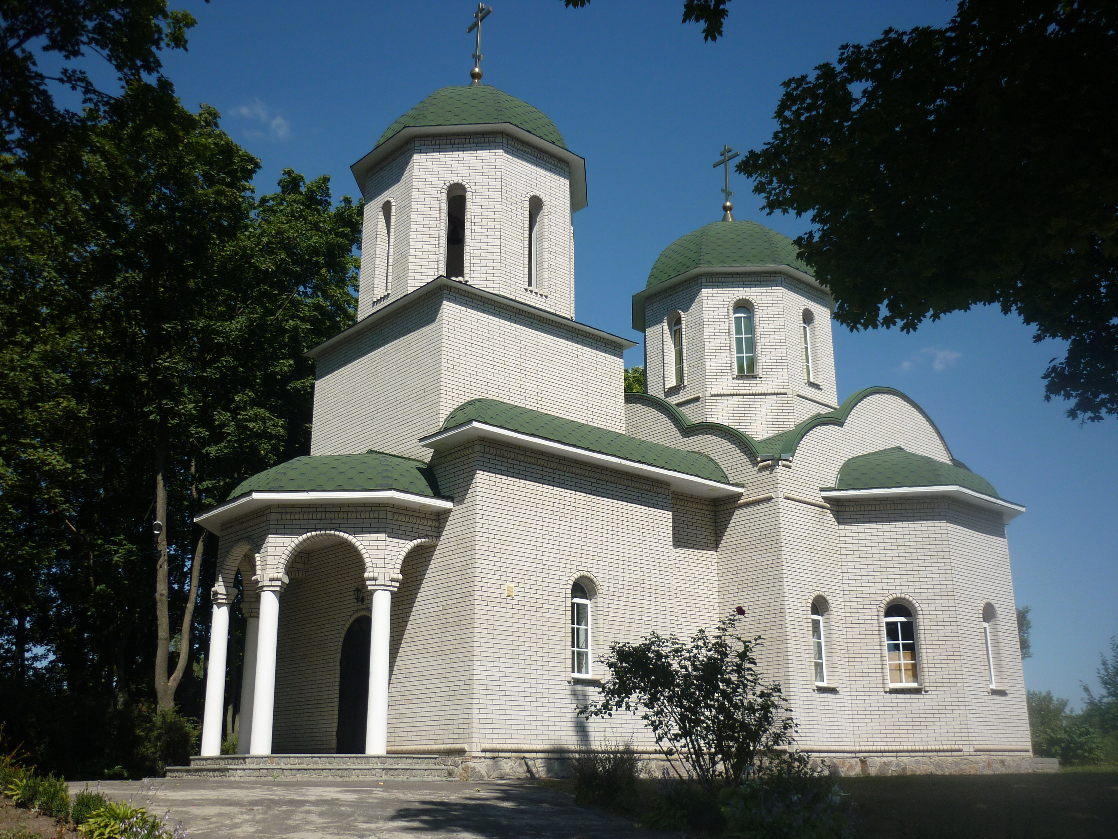 Село Полянецьке Уманського району. Церква